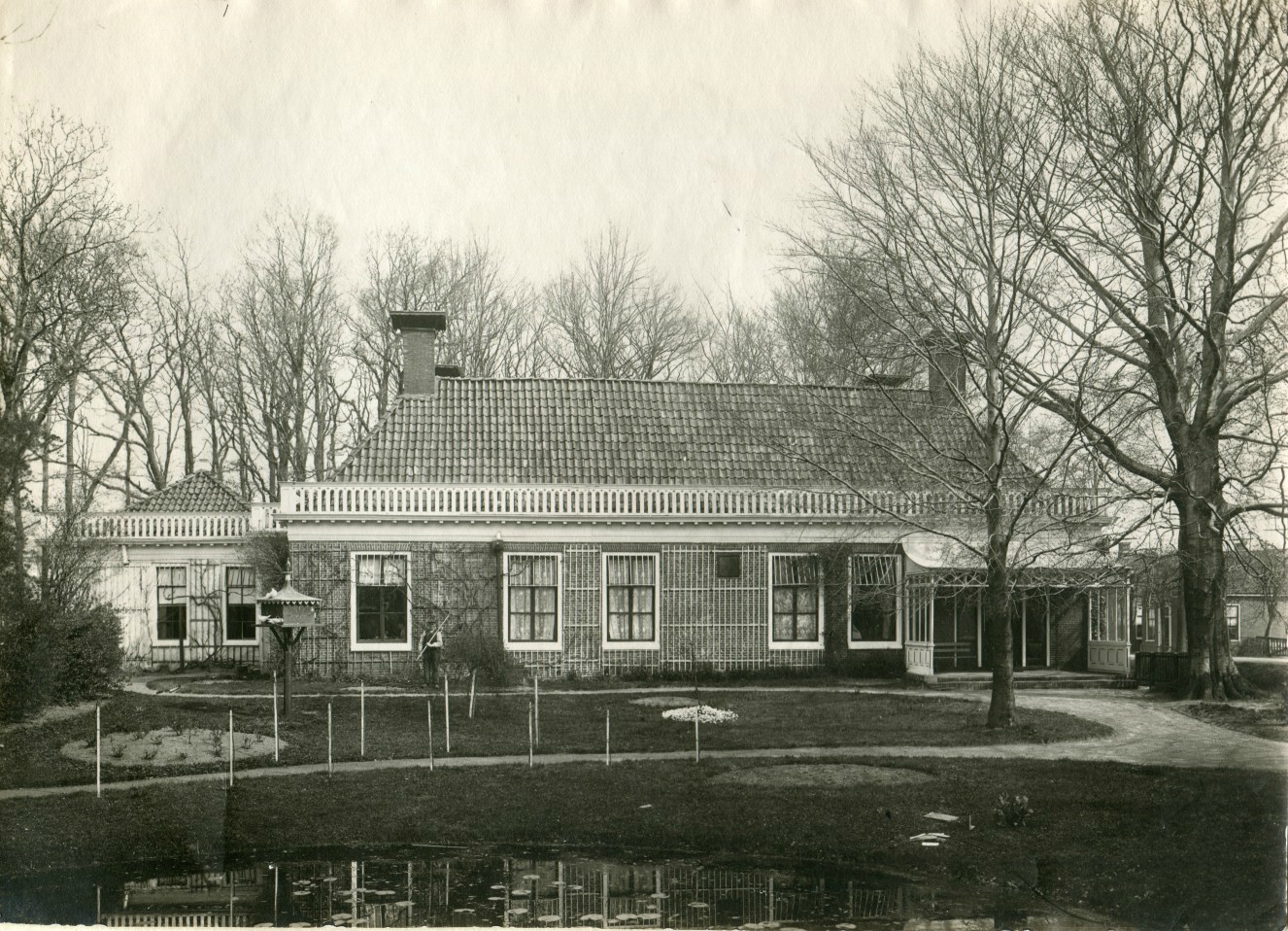 De voormalige veenborg Buitenwoel in Veendam (Groningen, Nederland), afgebroken in 1908.